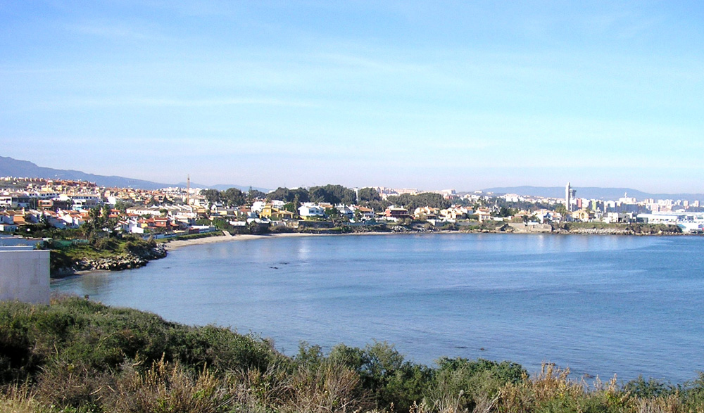 Playa de El Chinarral de Algeciras Fotografía de realización propia, noviembre de 2007